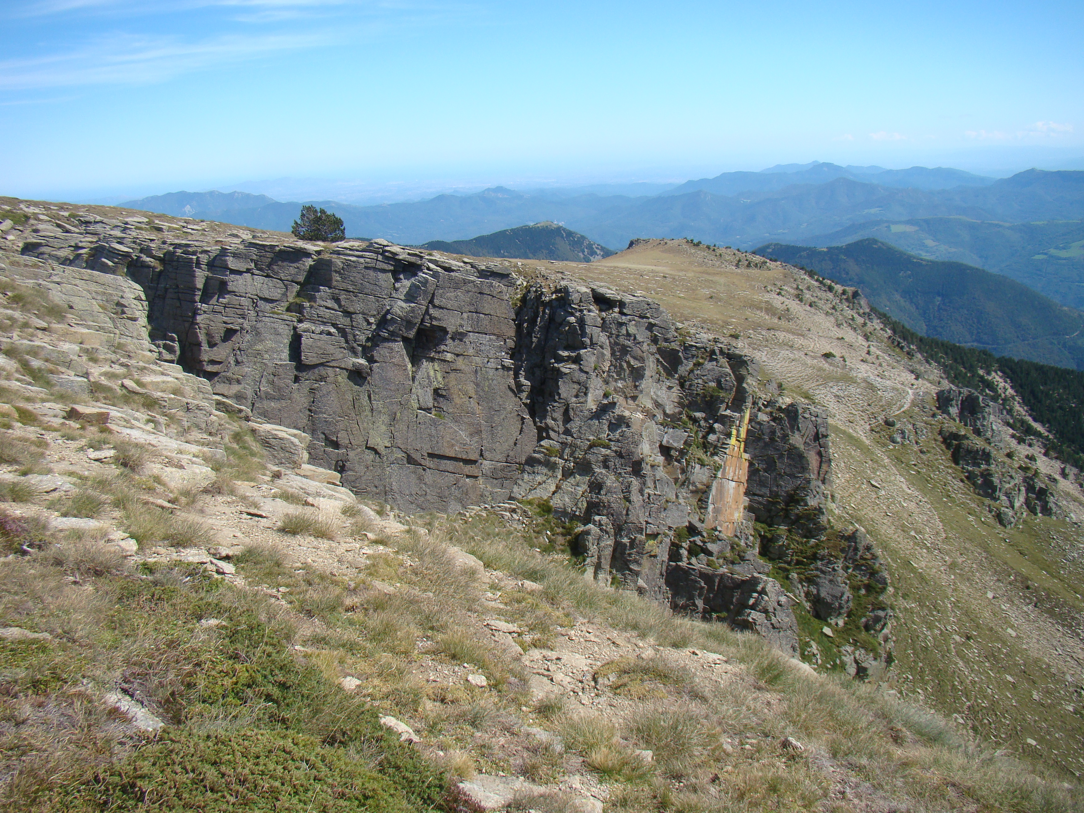 Pla Guillem